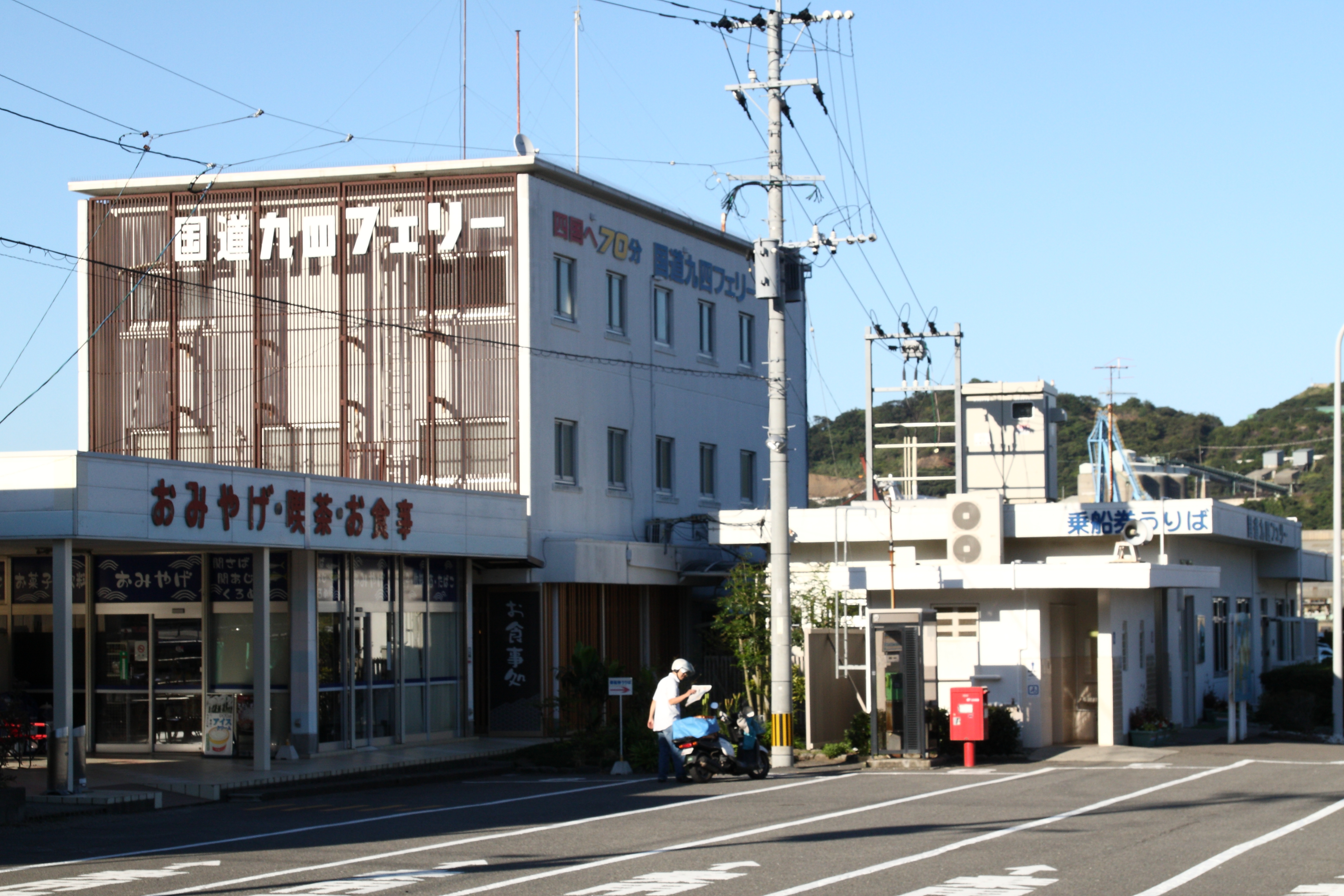 国道九四フェリー 佐賀関港乗り場